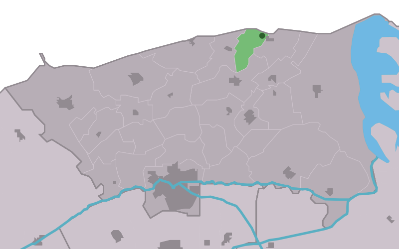 Kaartsje fan himrik fan Moddergat